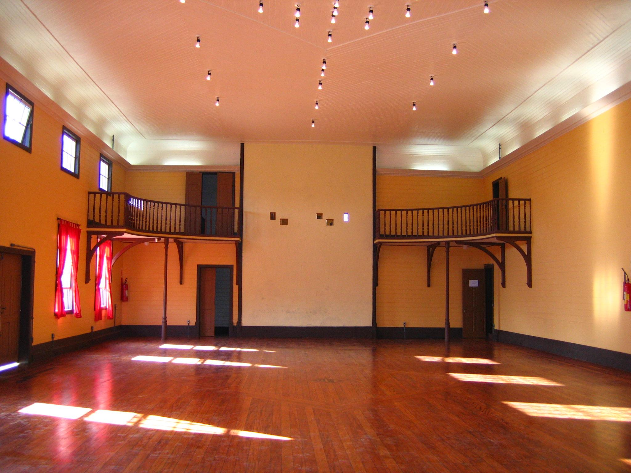 Vista interna do Clube União Lira Serrano de Paranapiacaba